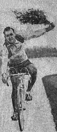 Maurice Desimpelaere vainqueur de Paris-Roubaix, le 9 avril 1944.